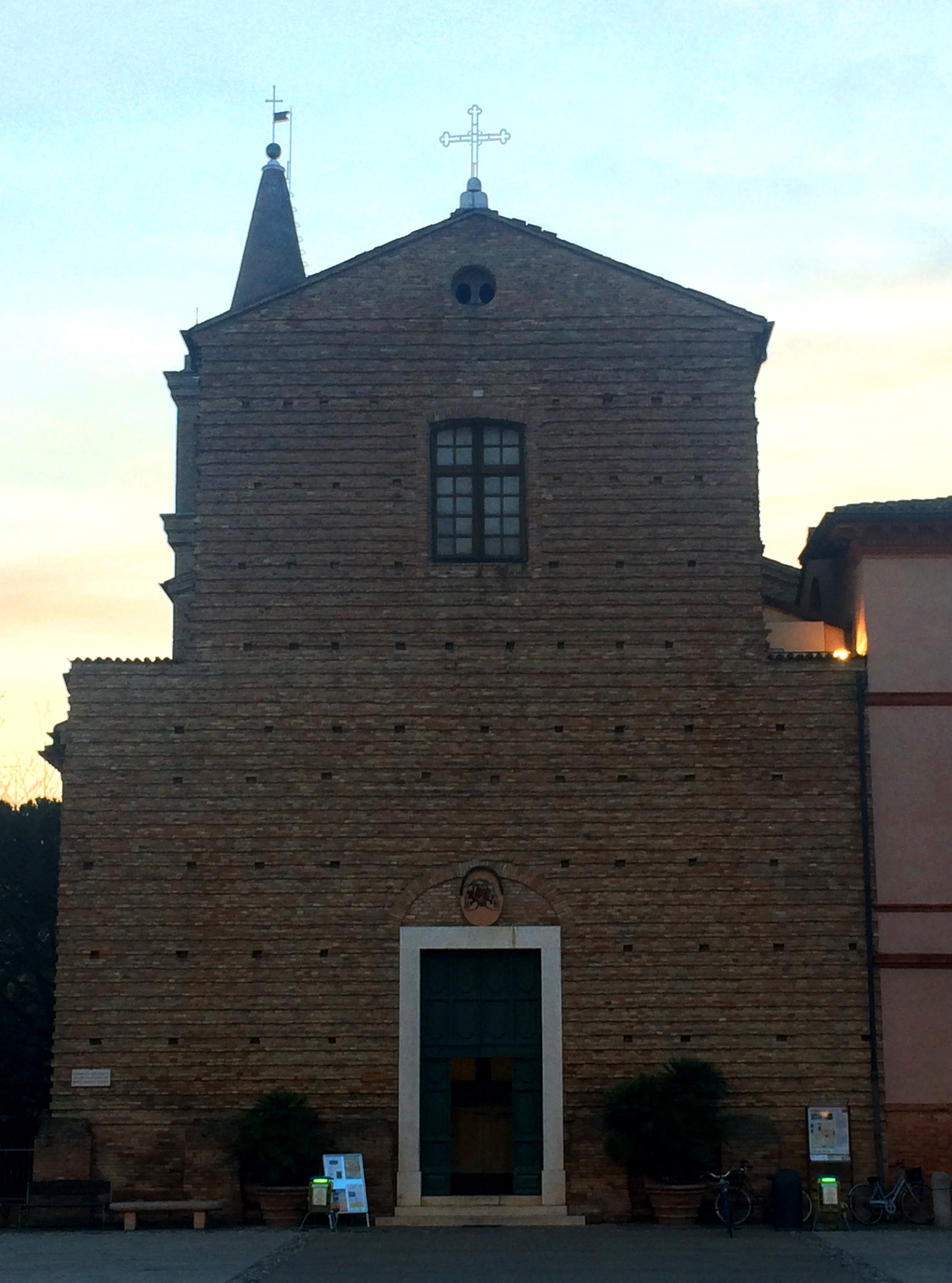 Facciata del duomo di Cervia